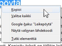 Kuvankaappaus leikepöydästä